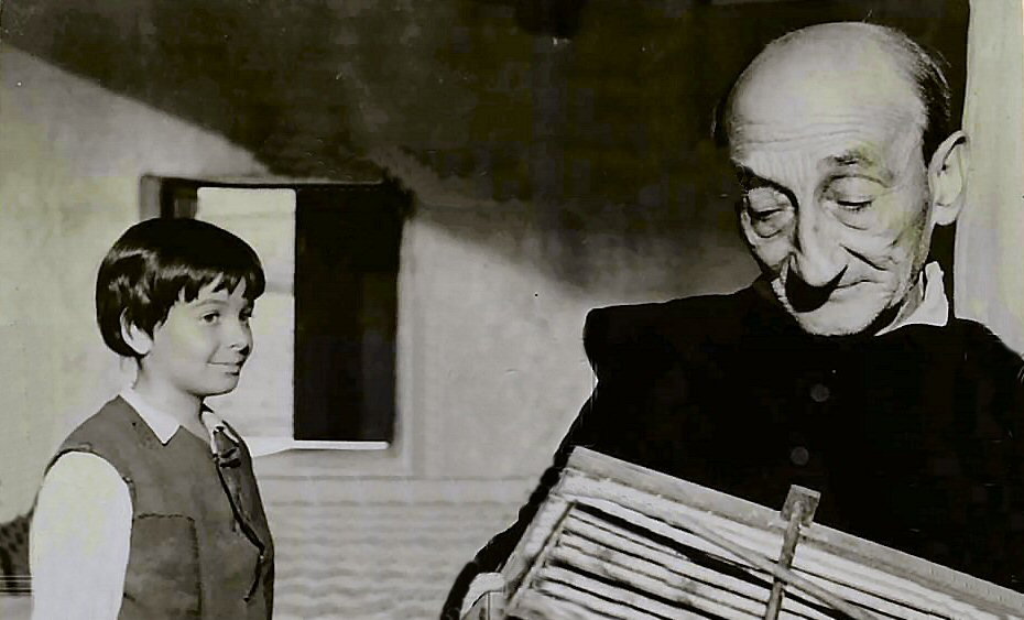 Fotogramma del film Lazarillo De Tormes